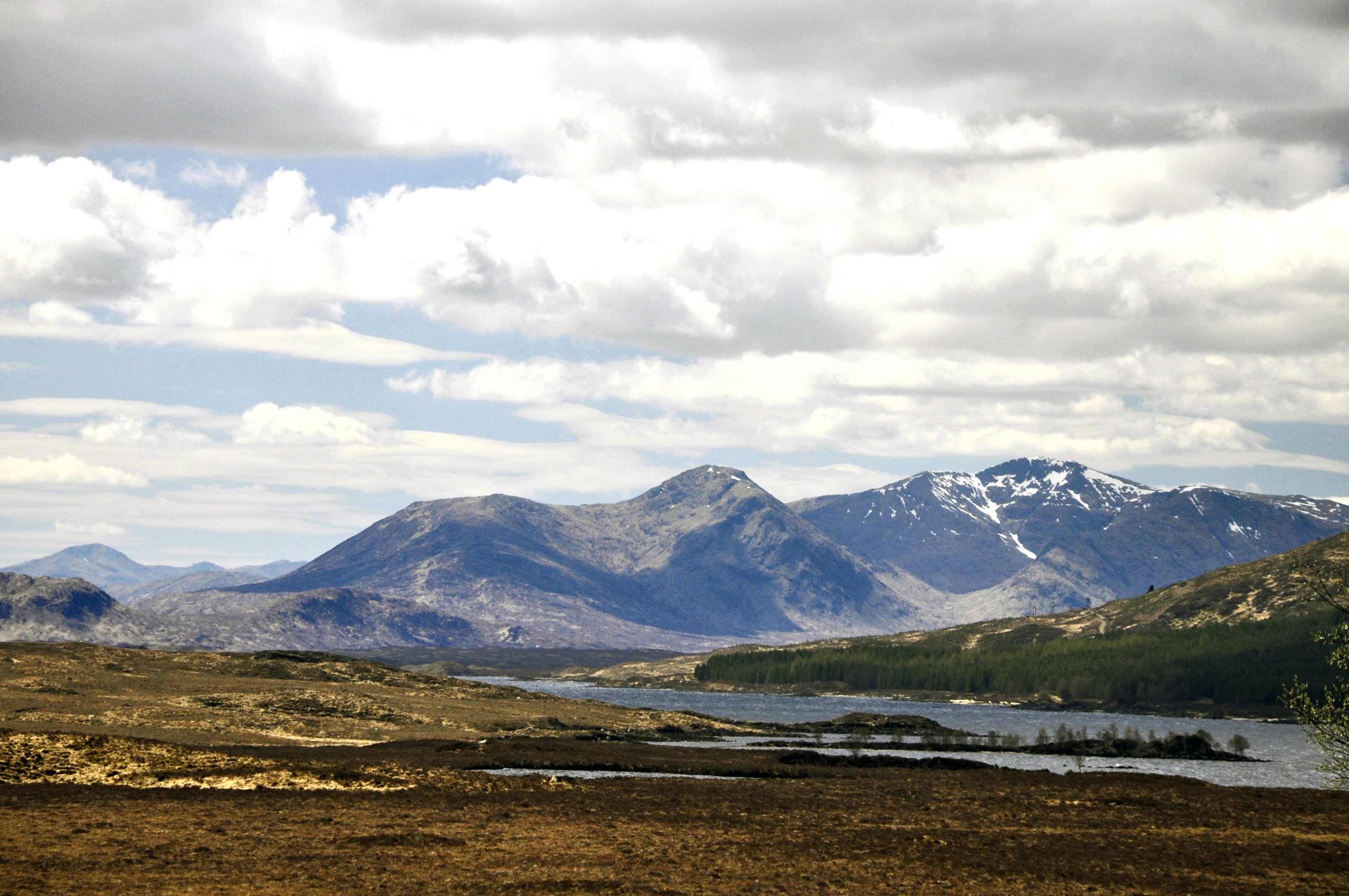 Rannoch Moor met Loch Laidon op de voorgrond en Stob Ghabhar van de richel Black Mount rechts achteraan, Schotland